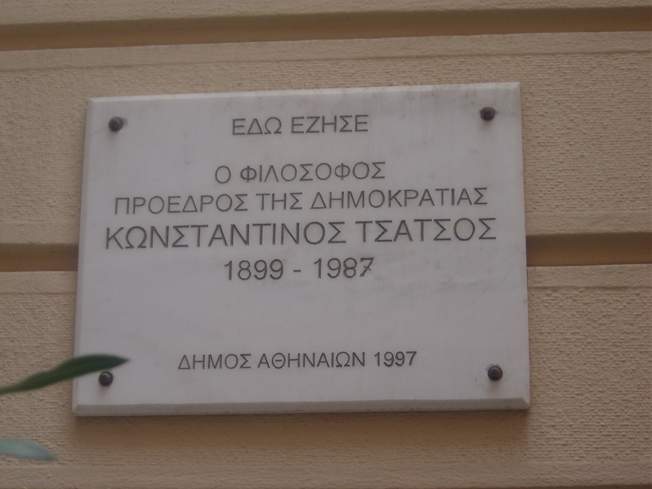 Label in front of Seferis, Tsatsos house in Plaka